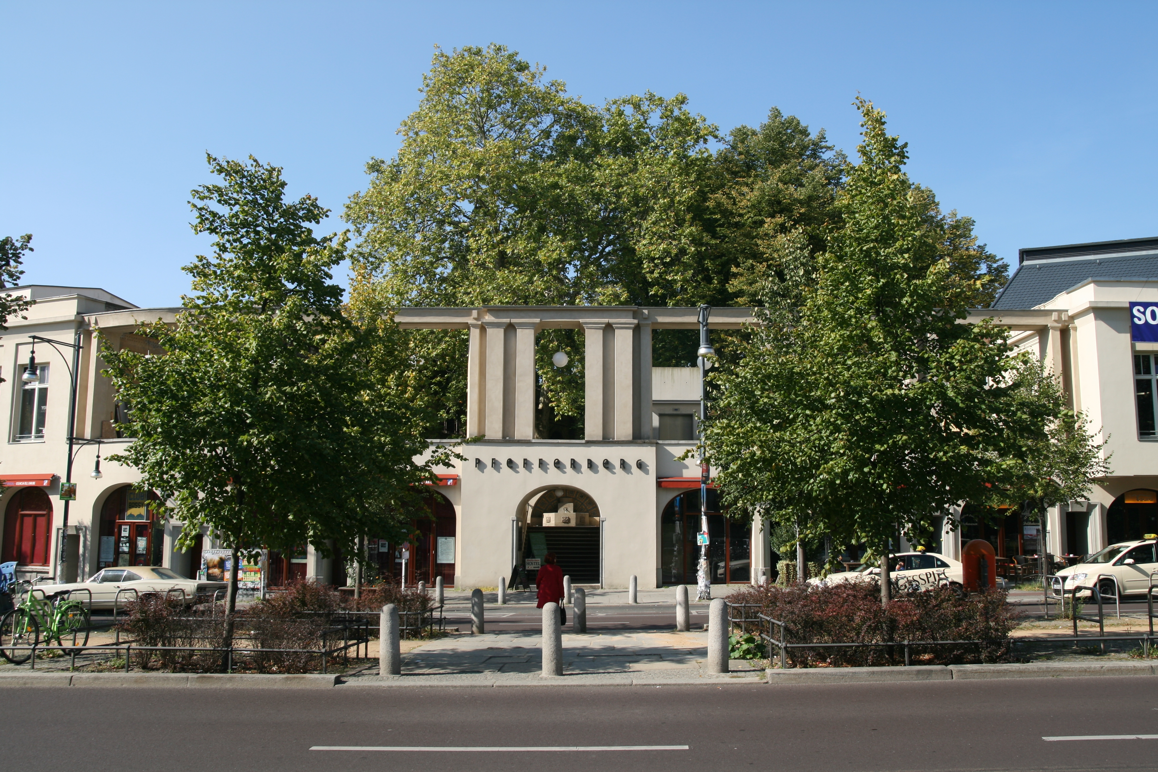 Brauerei - Pfefferberg ( Terrasse - Ansicht ) Schönhauser Alle 176